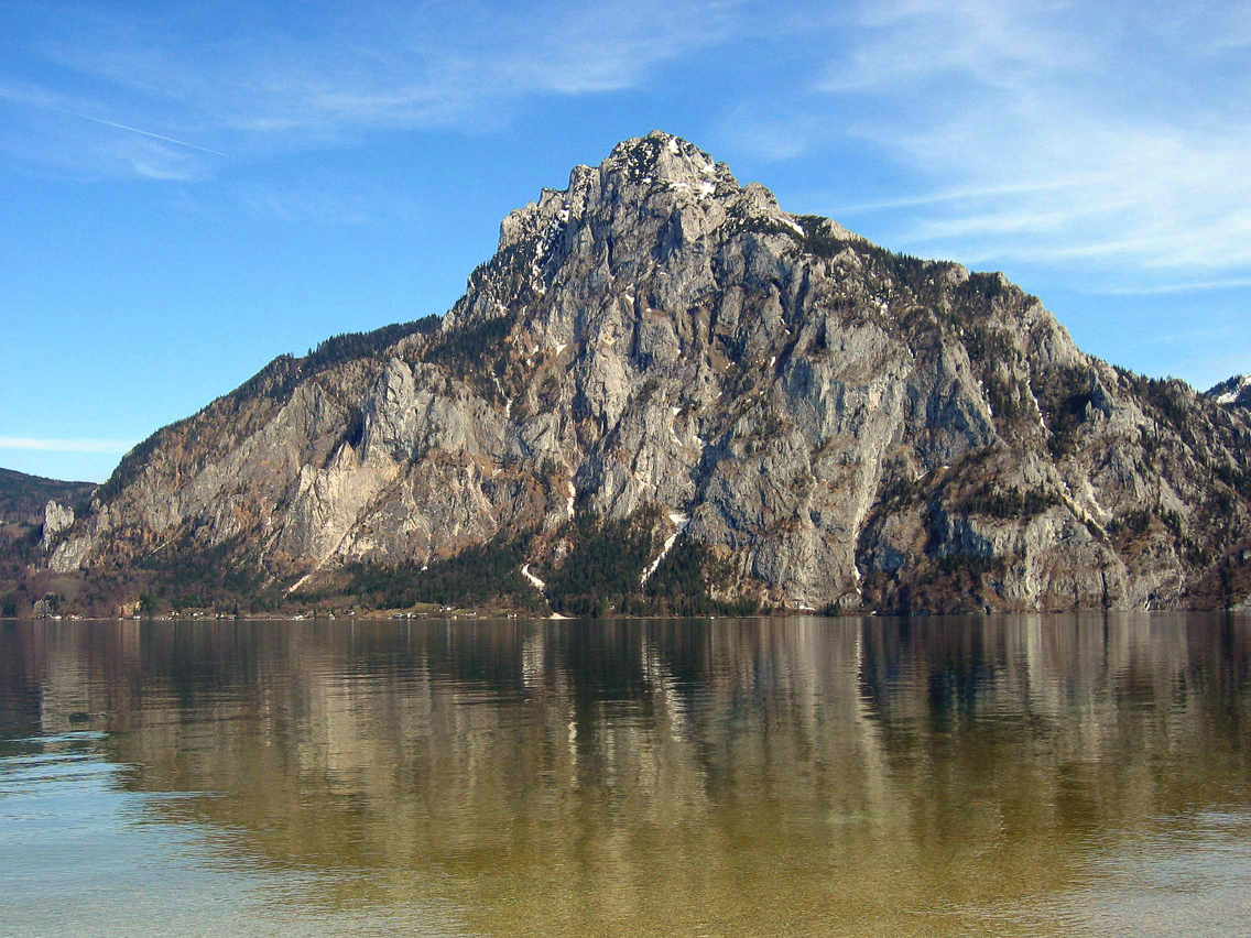 Traunstein (west side) with Traunsee / seen from Bräuwiese